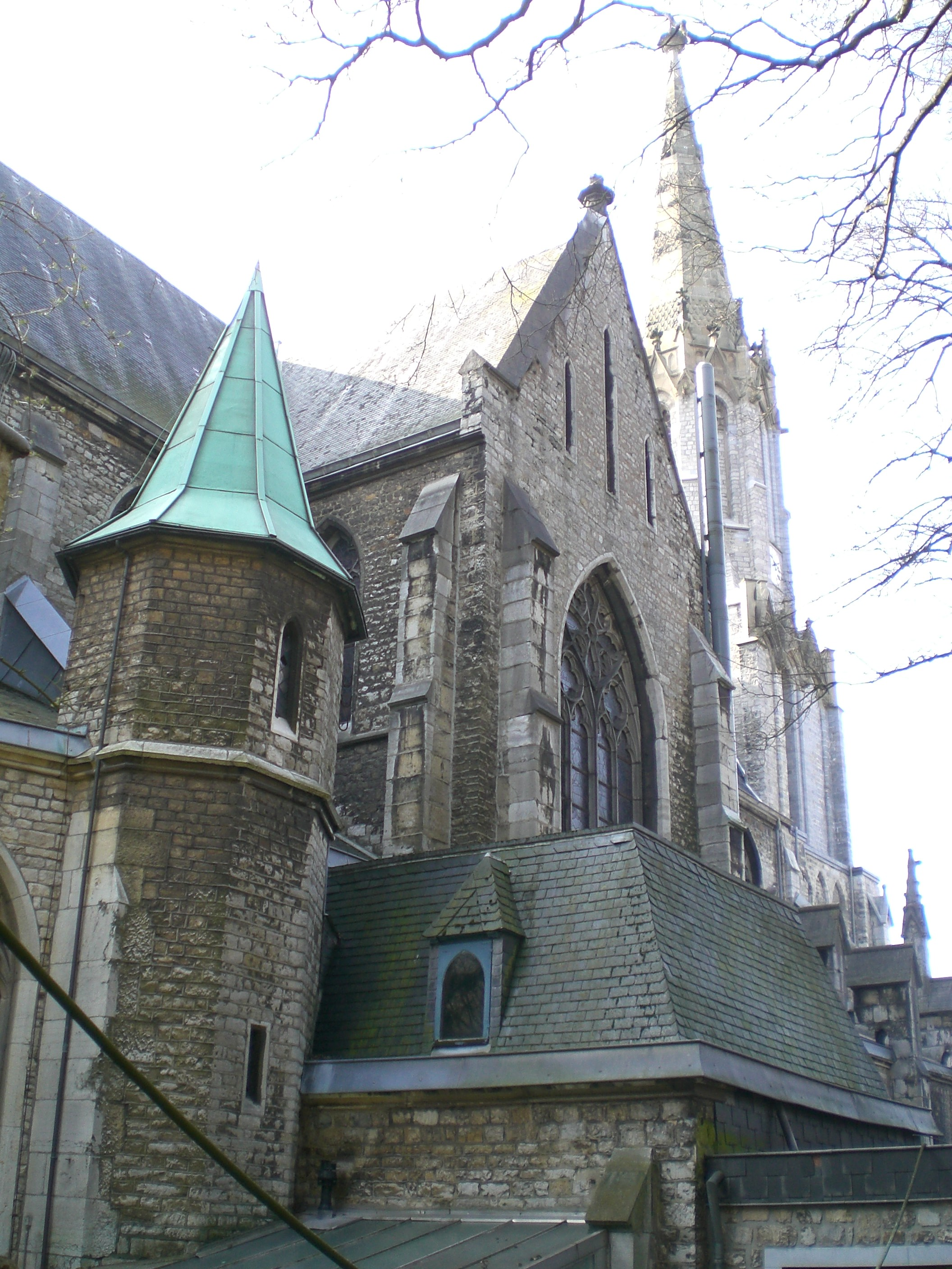 Eupen, Belgien 2011